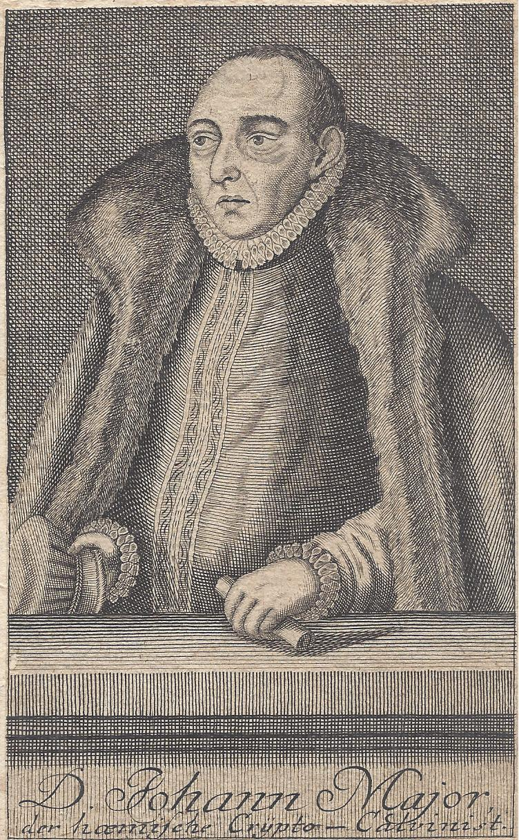 D. Johann Major, der hämische Kryptocalvinist. Literatur: Hans Dieter von Diepenbroik-Grüter, Allgemeiner Porträt-Katalog, Hamburg, S. 1931 f., Porträtkupferstich aus: Jacobi, Carl Ludwig, Fortgesetzte Sammlung von alten und neuen theologischen Sachen … auff das Jahr